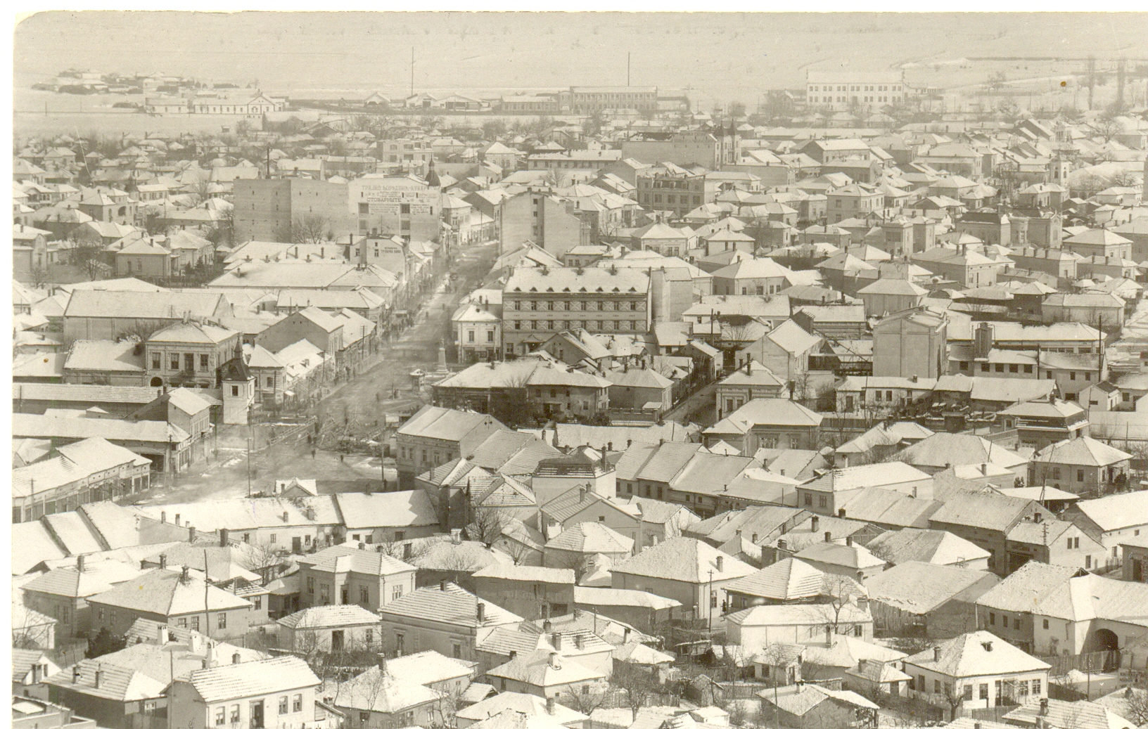 Srpski (latinica): Razglednica - Leskovac - Panorama, 1930-1931. Motiv je panorama centralnog dela Leskovca snimljen sa Hisara. Izdanje knjižare Prosveta, Leskovac.